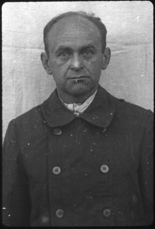 Friedrich Julius Wetzel (* 14. Juni 1909 in Wittenburg; † unbekannt) war SS-Hauptsturmführer und als Verwaltungsführer Leiter der Standortverwaltung verschiedener Konzentrationslager. Im Dachau-Hauptprozess wurde er zum Tode verurteilt, das Urteil wurde im Überprüfungsverfahren auf 10 Jahre Haft reduziert.